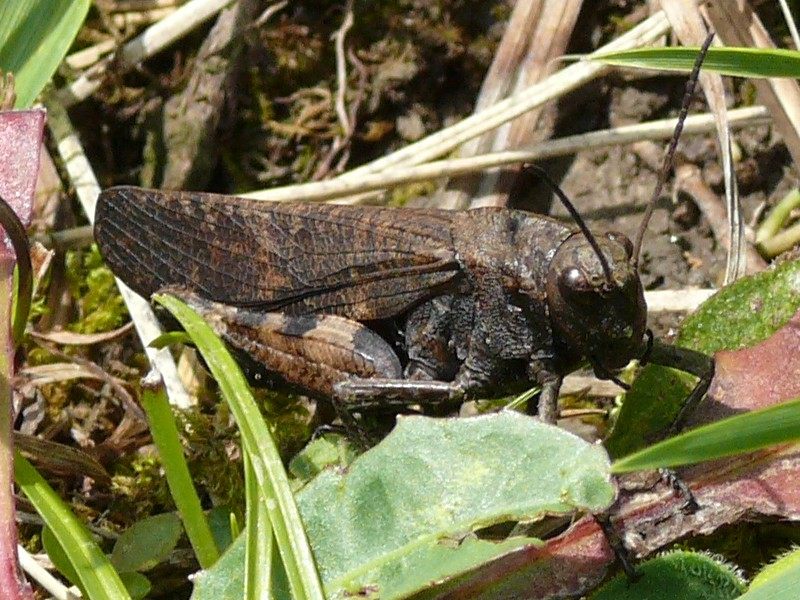 Psophus stridulus